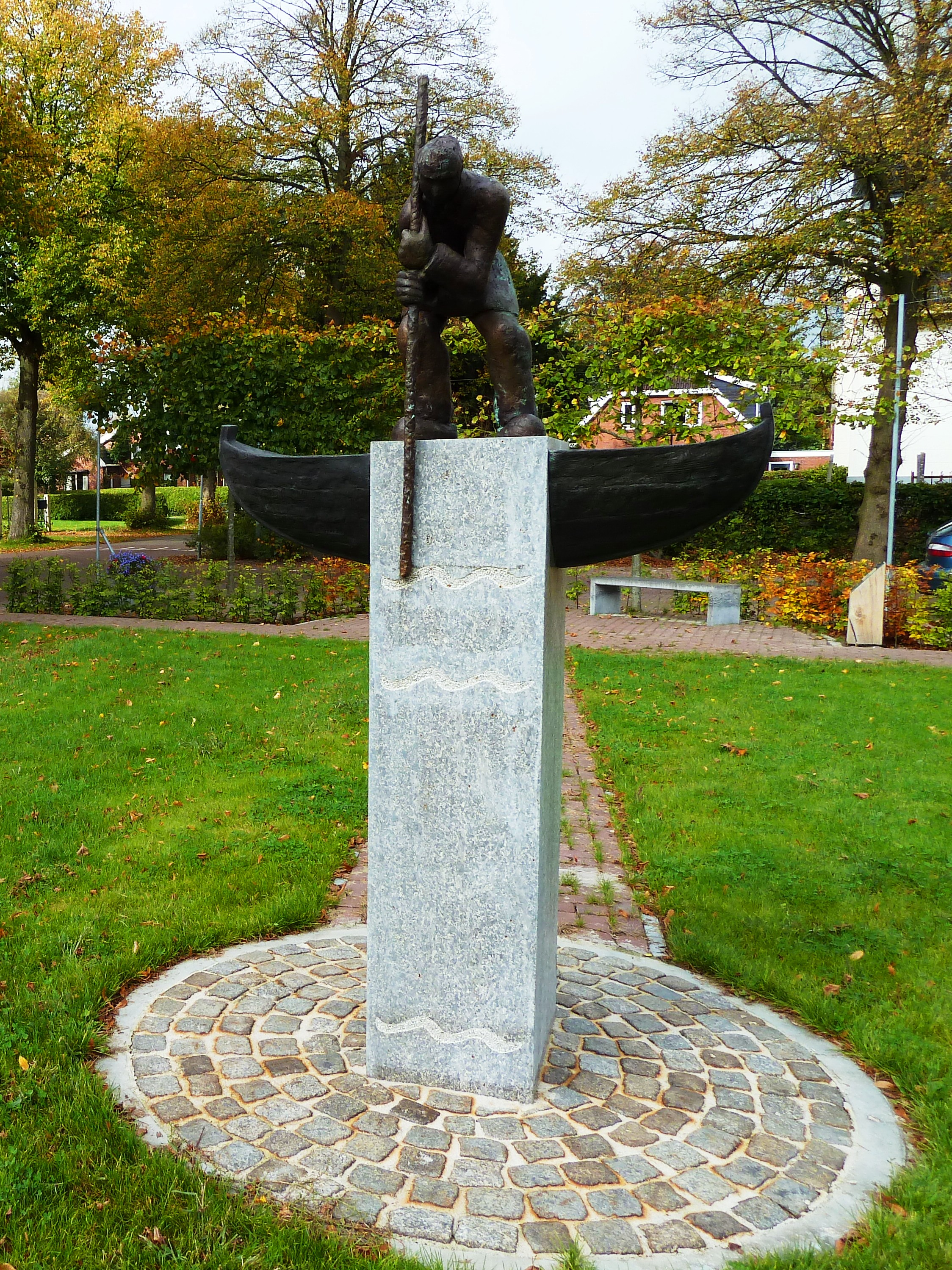 Kunstwerk 'De Baggelaar' (baggeraar in het laagveen) van Brenda Hardijk. In 2010 geplaatst in Westerbroek.